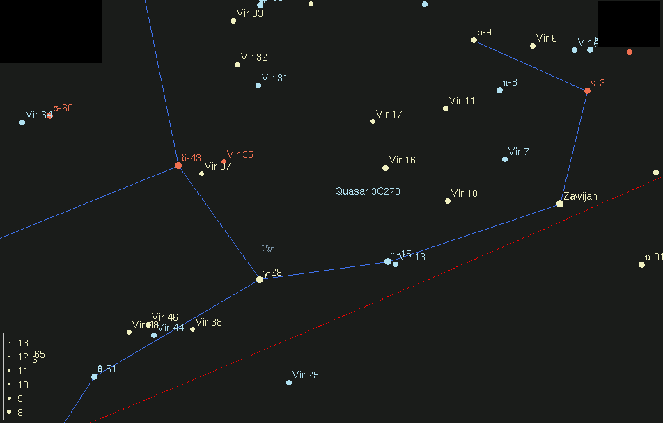 Aufsuchkarte für Quasar 3C273. Die rote Linie markiert die Ekliptik, darüber ist der westliche Teil des Sternbilds Jungfrau zu sehen. "Natürliche" Ausrichtung: Norden ist oben, Osten links. Autor: Klaus Hohmann